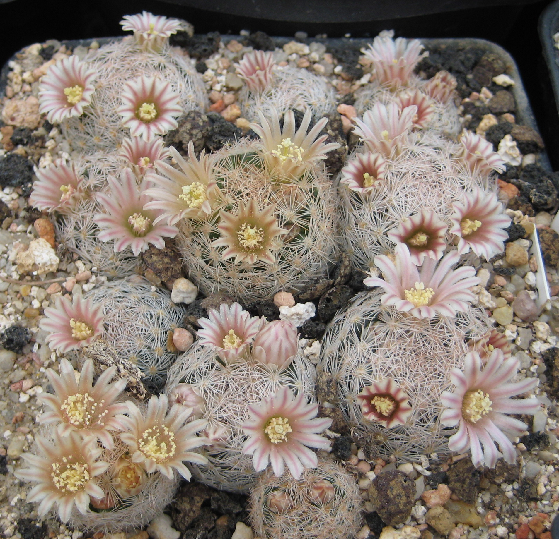 Mammillaria magallanii, mehrere Sämlinge